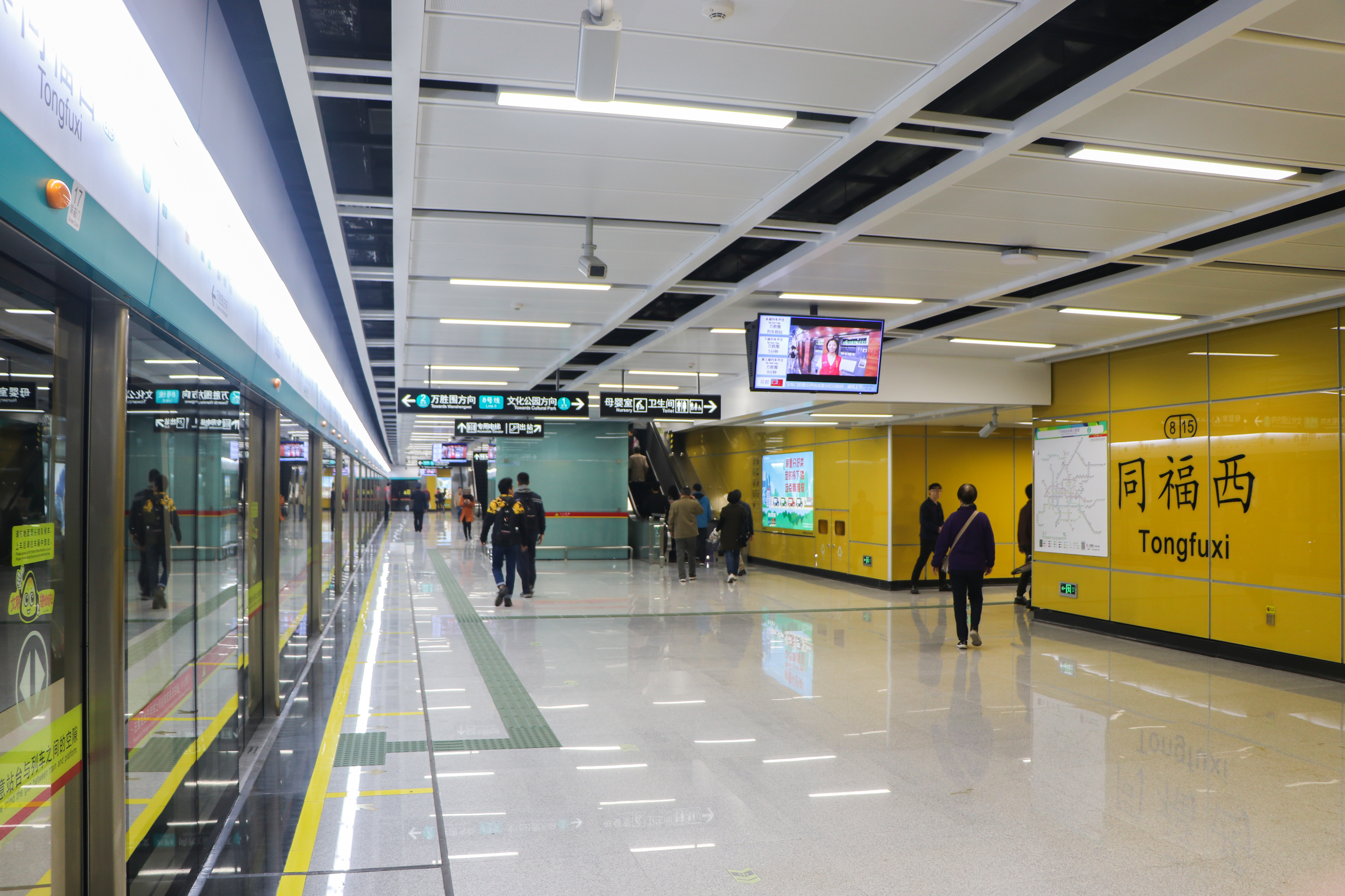 广州地铁同福西站